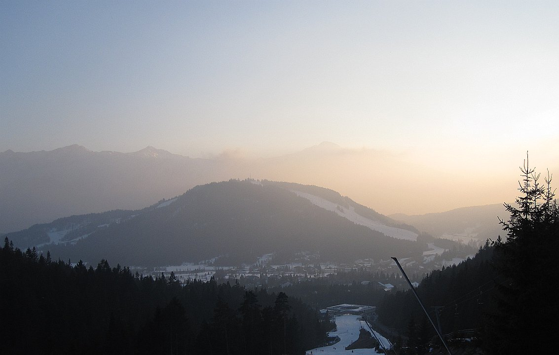 Gschwandtkopf with Seefelder Sattel from northeast - left side: direction Innsbruck, right side: direction Seefeld